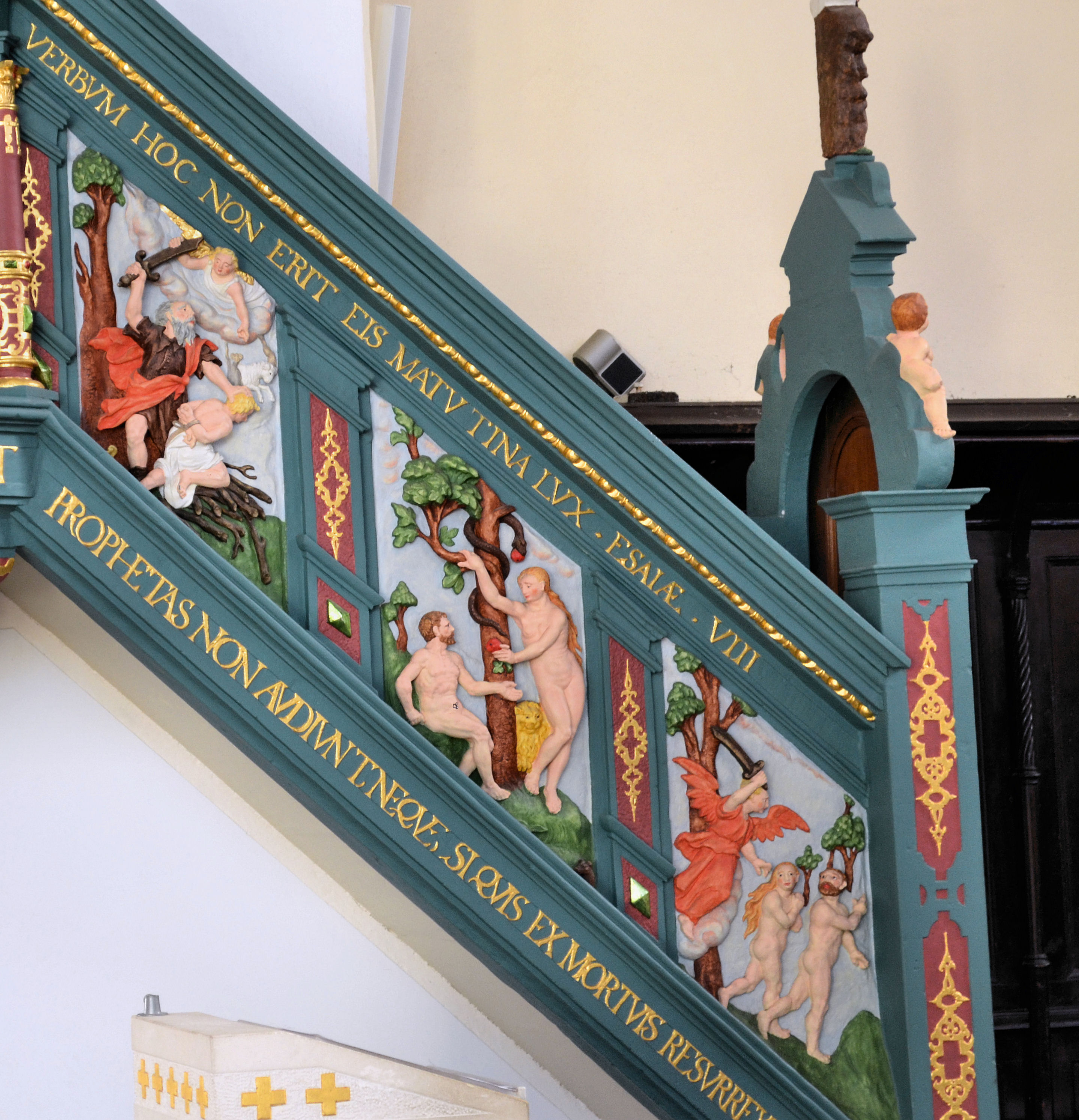 Kościół Narodzenia Najświętszej Maryi Panny w Gryfinie